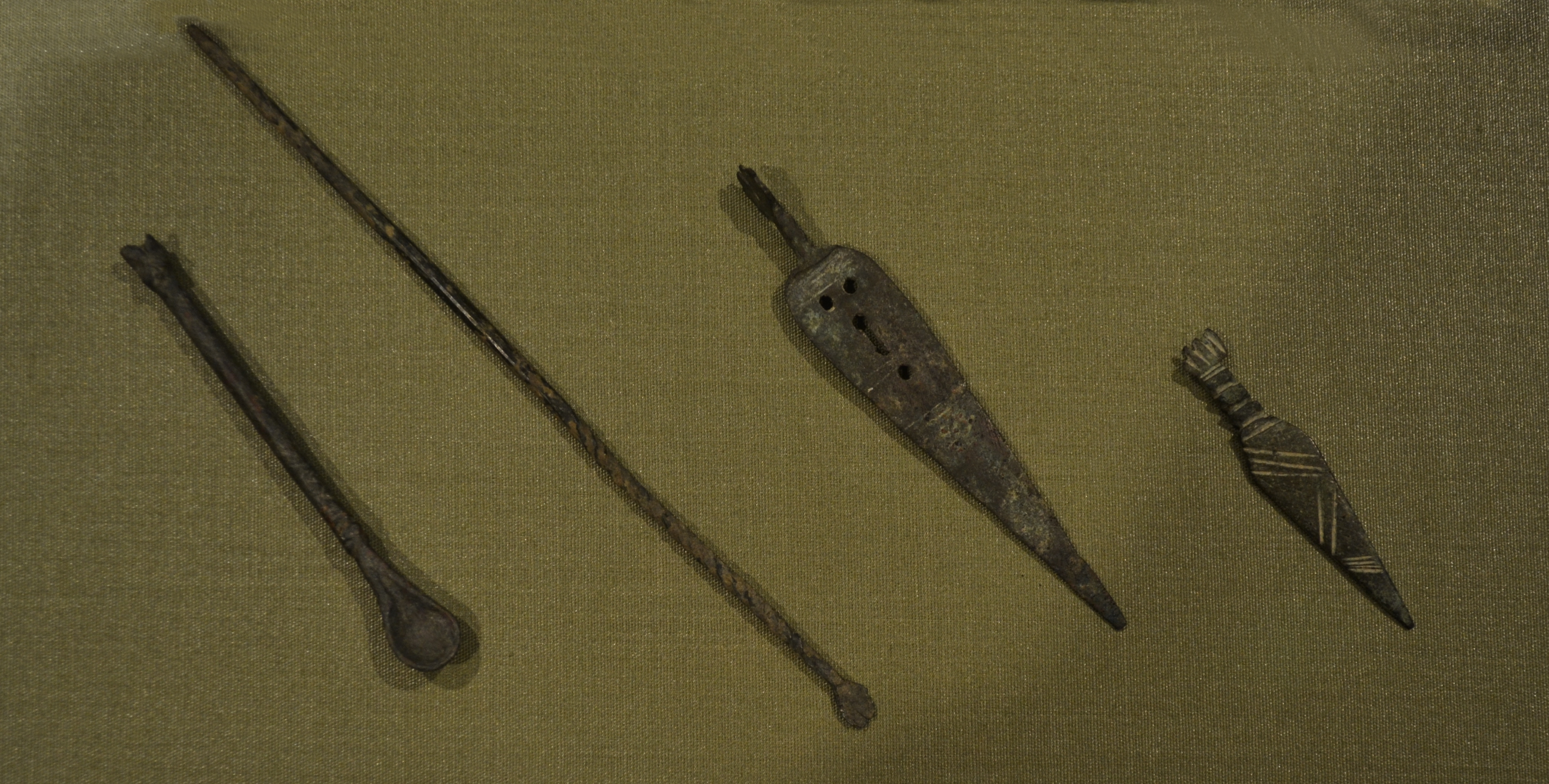 Instruments quirúrgics i frontisses. Castella (Alcoi). Segles XI-XIII. Museu Arqueològic Municipal d'Alcoi.